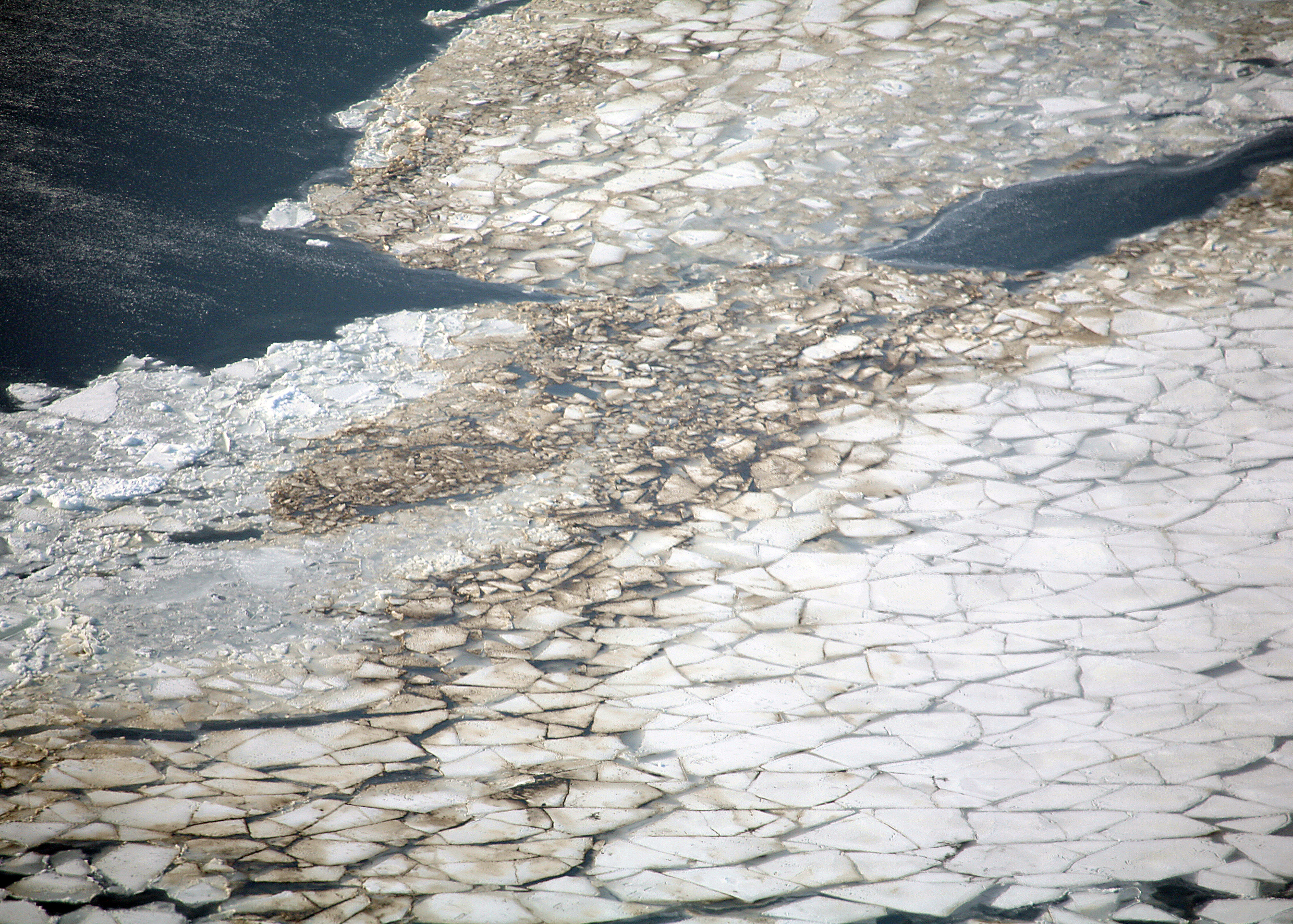 Talvine reostus Läänemerel.